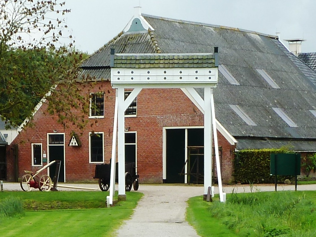 Duivenslagpoort bij museumboerderij Welgelegen op Landgoed Verhildersum bij Leens in de Nederlandse provincie Groningen. De duivenslag is minstens 200 jaar oud en is afkomstig van de in 1973 afgebrandde boerderij Boelsemaheerd aan de Hemerterweg 3 in het Groningse gehucht Hemert nabij Lellens. Bij de buurman, boerderij Dinghweer aan de Hemerterweg 2, bevindt de duivenslagpoort zich nog wel bij de boerderij.